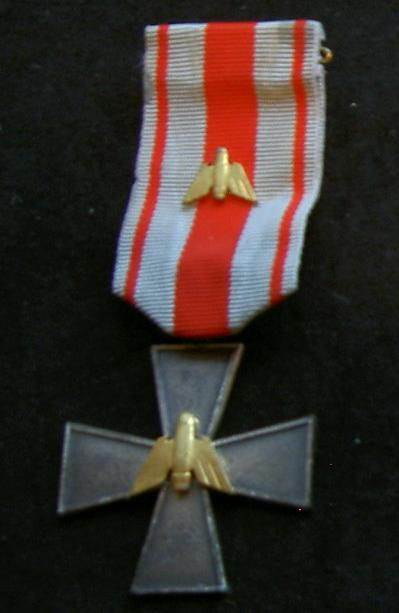 Order of merit of anti aircraft